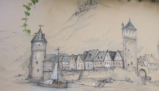 St. Goarshausen - Stadtansicht um 1850 - Wandbemalung in St. Goarshausen Aufnahme: September 2007 Url